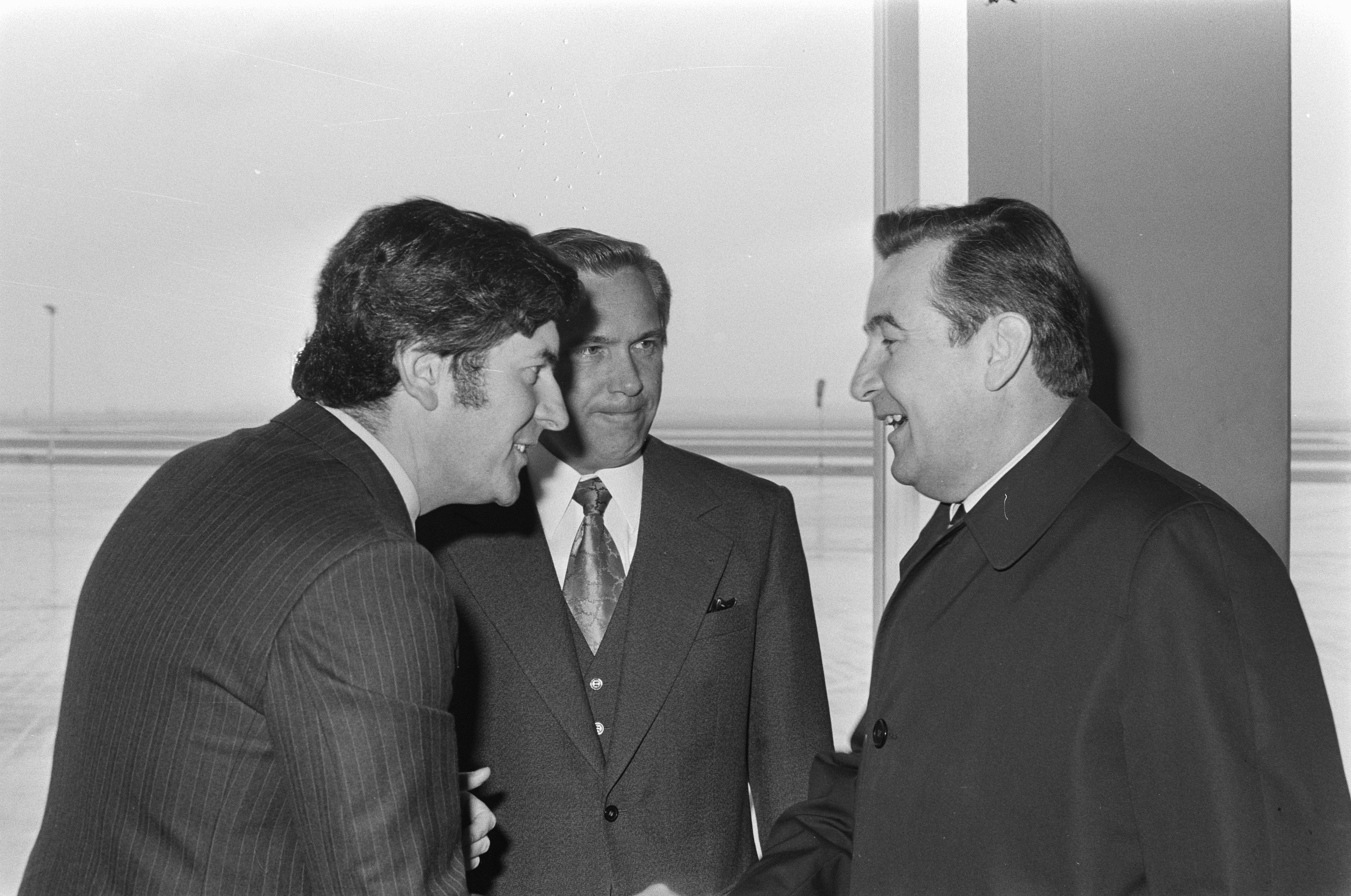 Collectie / Archief : Fotocollectie Anefo Reportage / Serie : [ onbekend ] Beschrijving : DDR-minister van Handel, H. Solle , op Schiphol, v.l.n.r minister Lubbers , DDR-ambassadeur K. Wolf en minister H. Solle Datum : 11 juni 1974 Trefwoorden : ambassadeurs, ministers, vliegvelden Persoonsnaam : H. Solle, K. Wolf Fotograaf : Croes, Rob C. / Anefo Auteursrechthebbende : Nationaal Archief Materiaalsoort : Negatief (zwart/wit) Nummer archiefinventaris : bekijk toegang 2.24.01.05 Bestanddeelnummer : 927-2478